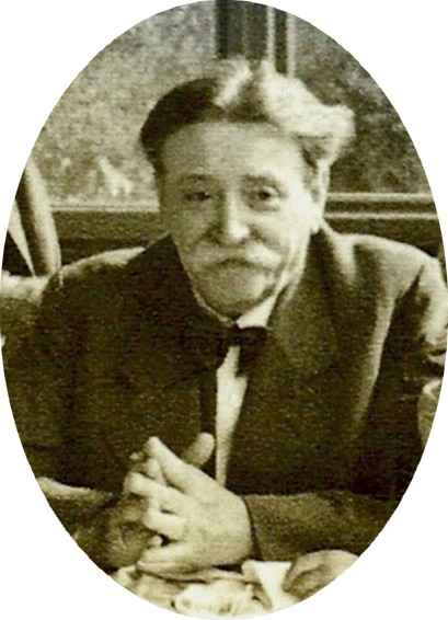 Eduard Bloch (1872 - 1945), Židovský lékař původem z Čech.